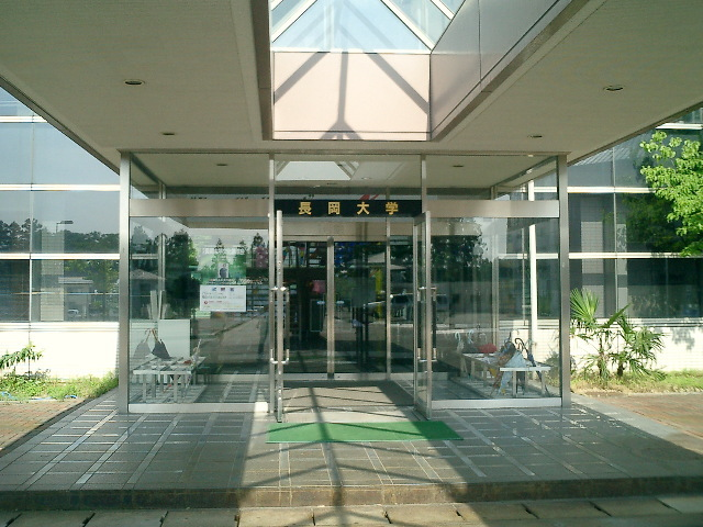 長岡大学 正面玄関 2005-07-02 Aney at Japanese Wikipedia撮影